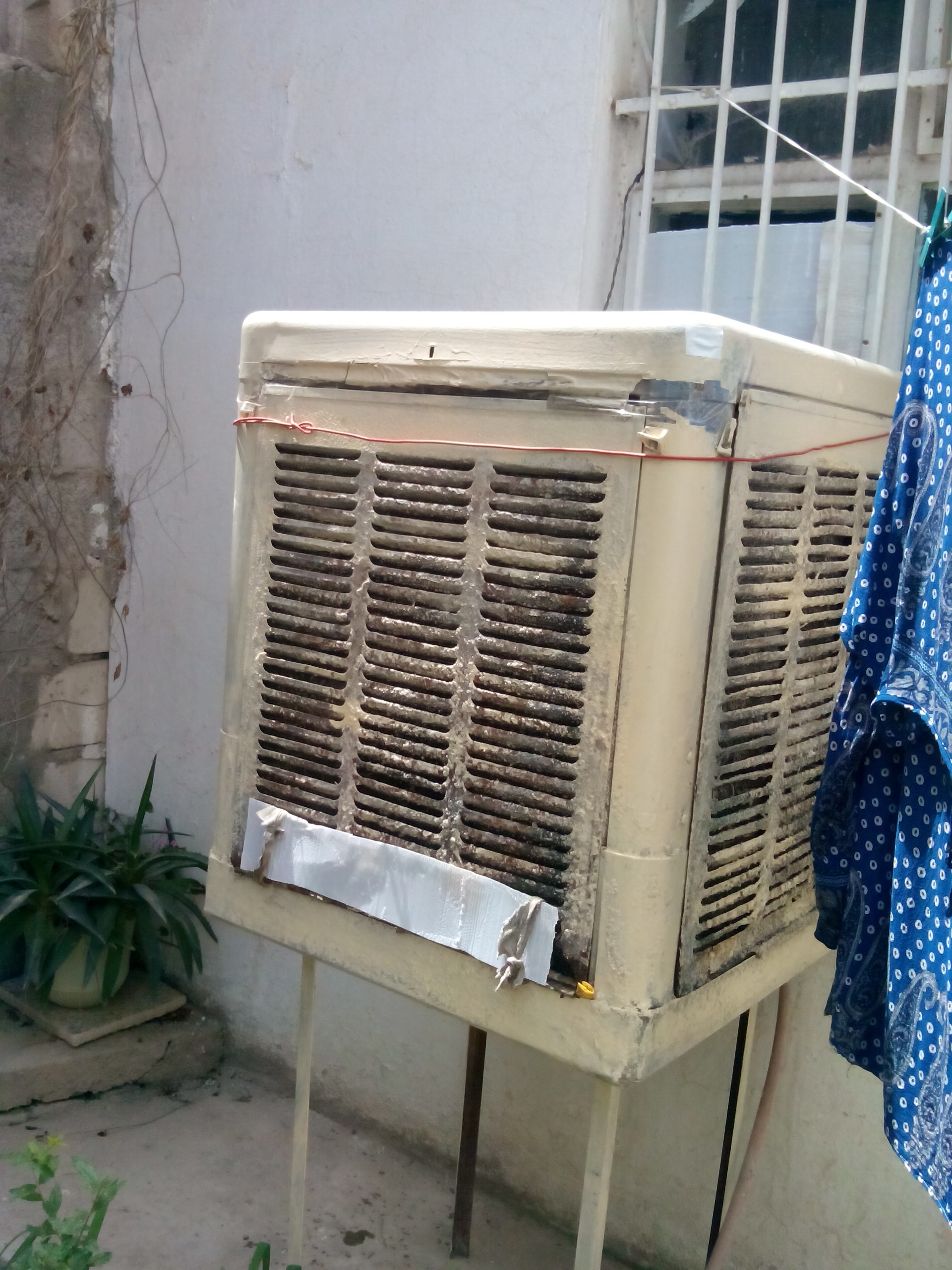 مبردة من نوع قديم تعمل في بيت بغدادي منذ عقد الثمانينيات إلى الوقت الحالي لتكييف الهواء